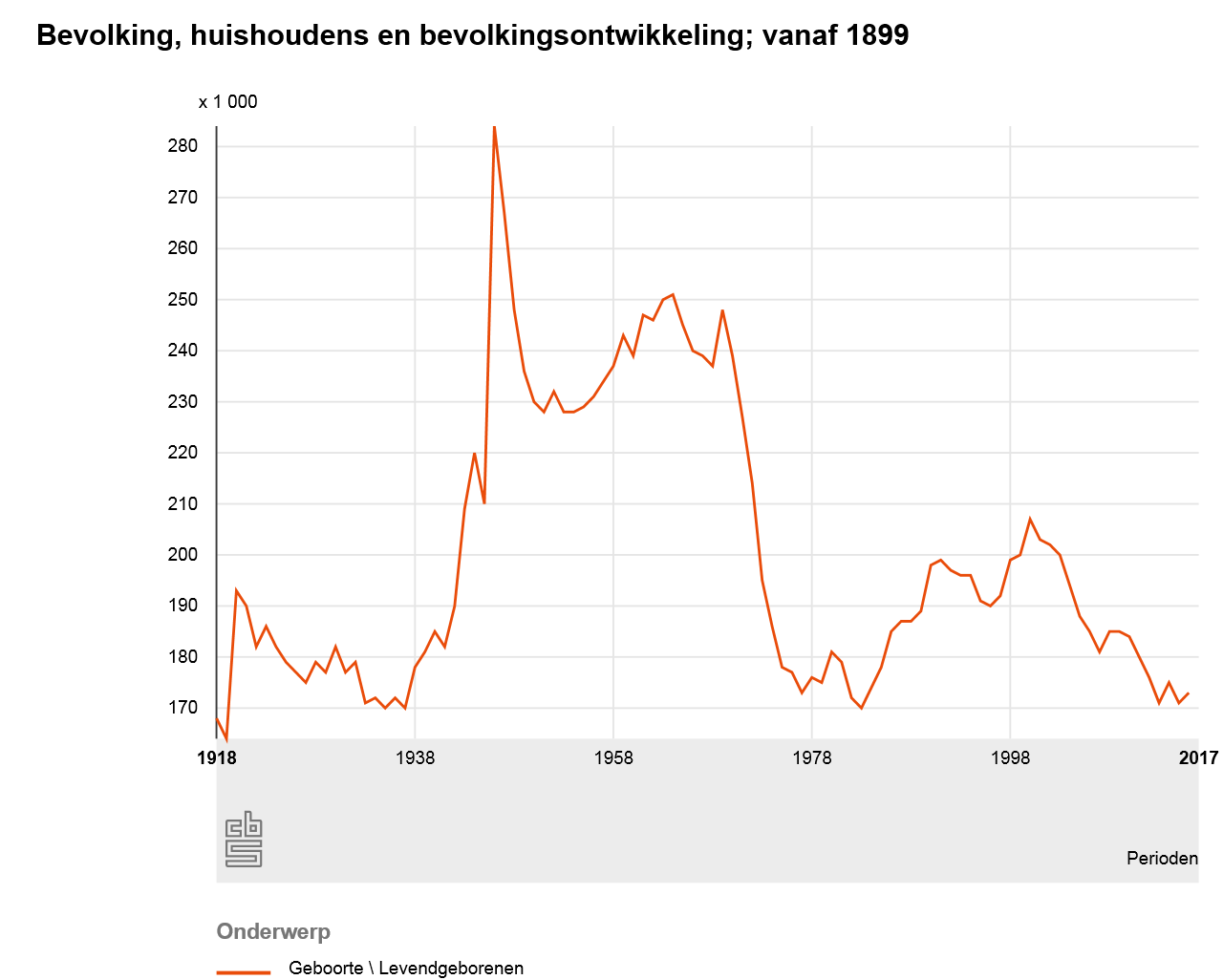 Levendgeborenen vanaf 1899